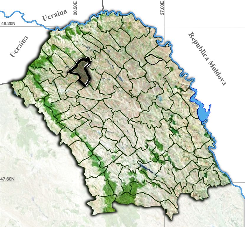 George Enescu jud Botosani.